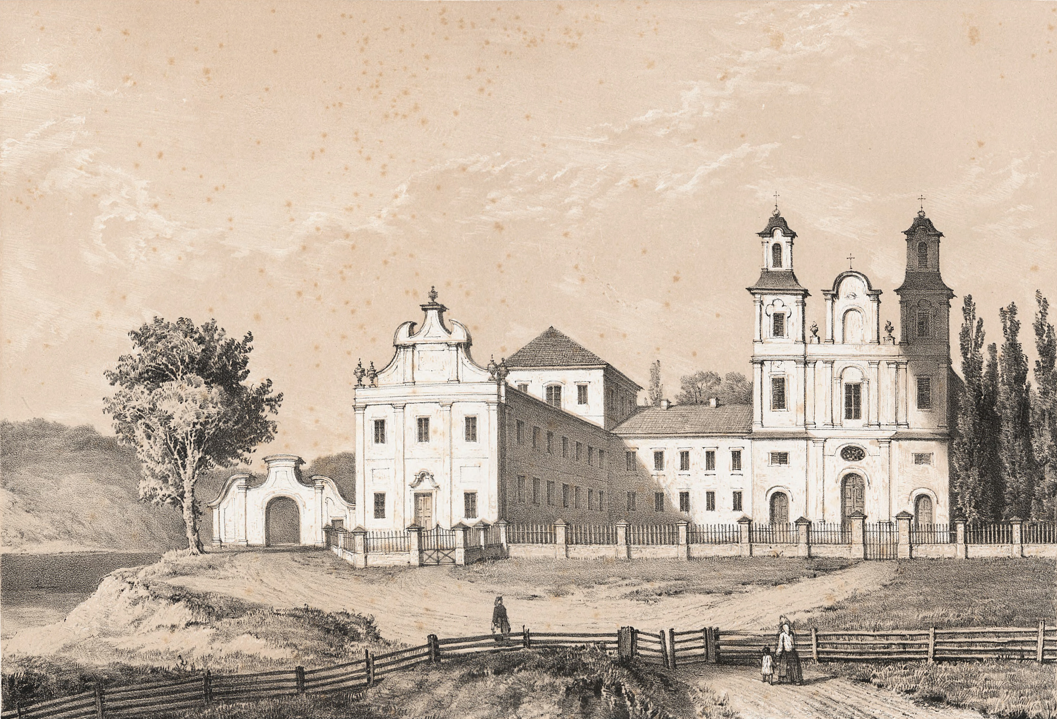 Село Городище Заславського повіту Волинської губернії. Костел отців кармелітів. Давня посілість родини Єрличів. Літограф літографії Максиміліана Фаянса за малюнком Наполеона Орди.